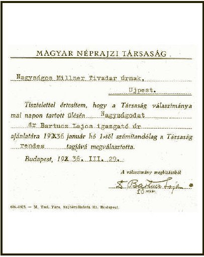 A Magyar Néprajzi Társaság értesítése Millner Tivadar részére.